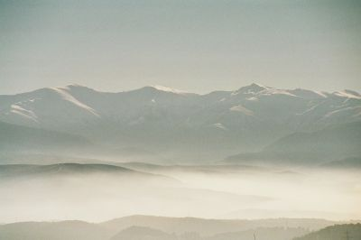 El Morredero, Cabeza de la Yegua y Pico Tuerto, parte de los Montes Aquilanos (El Bierzo, León, España).